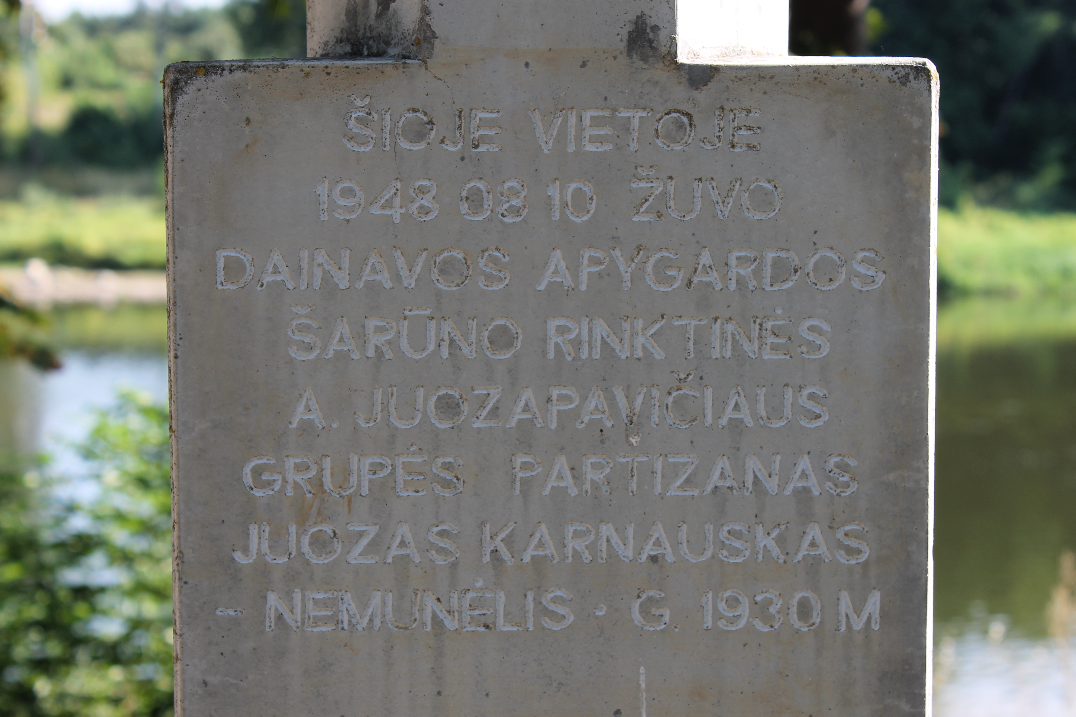 Partizano Juozo Karnausko atminimo ženklas, Druskininkai, Lietuva